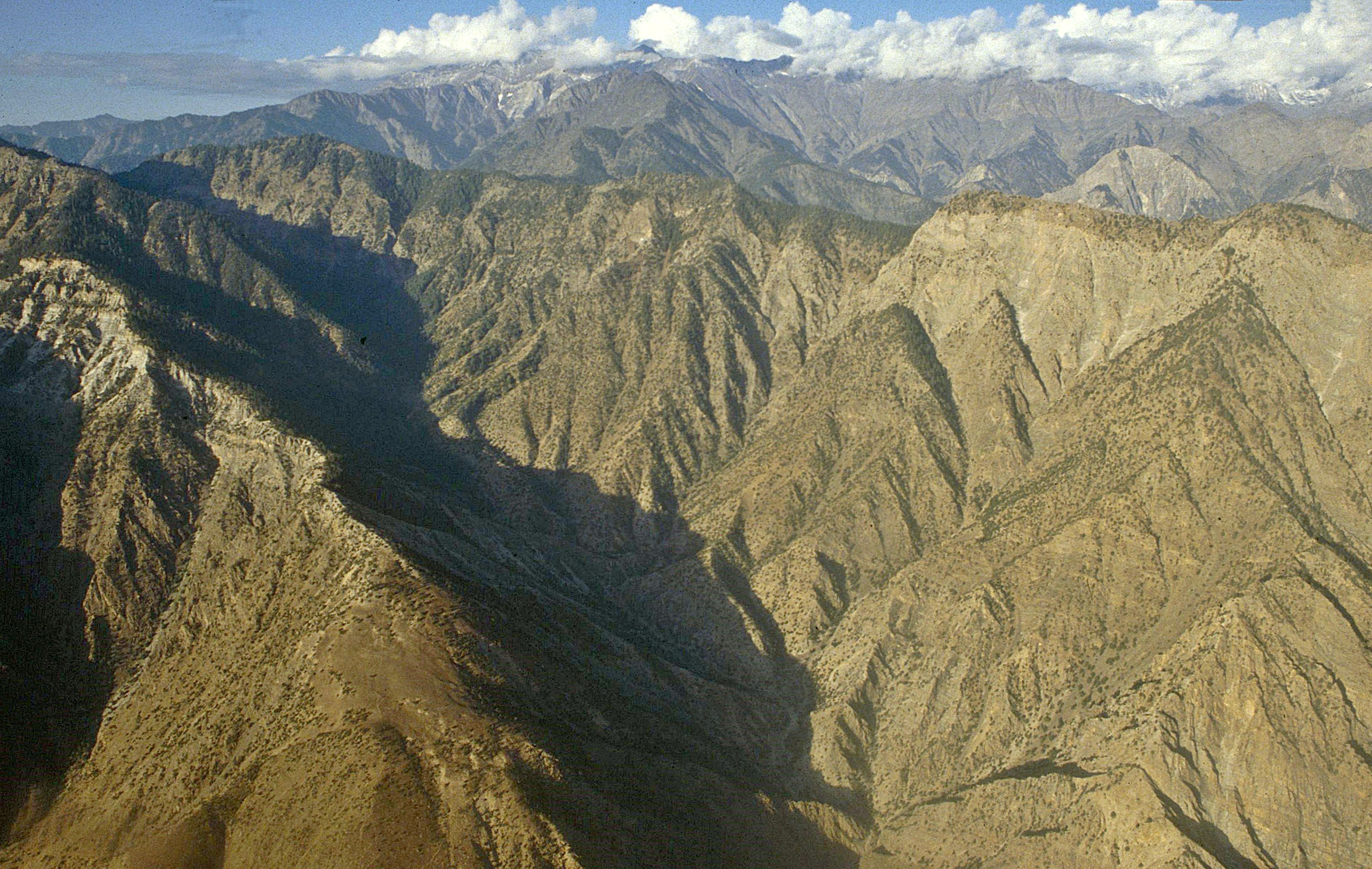 Flug von Peshawar nach Chitral: Hindukusch